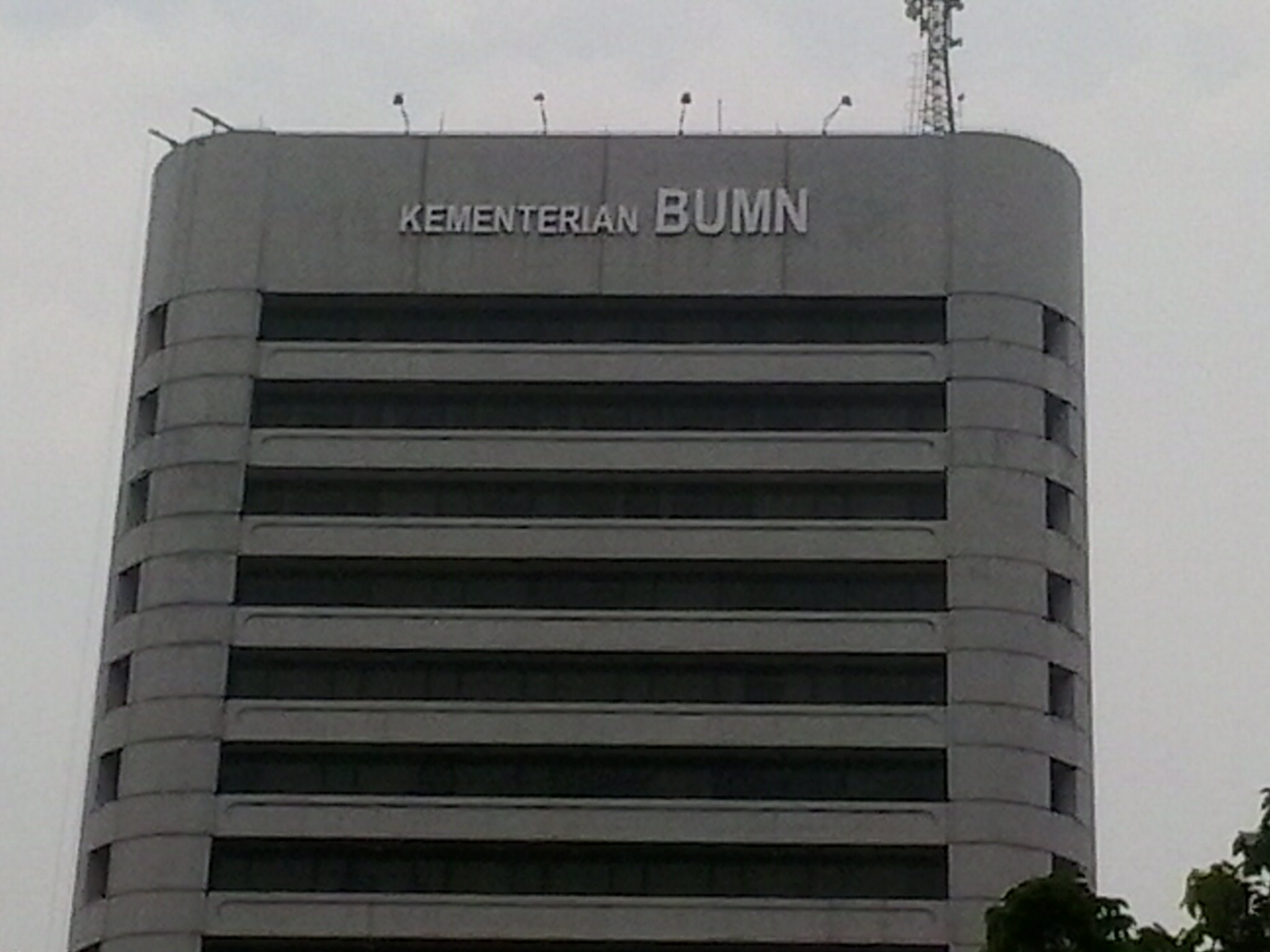 Gedung Kementerian BUMN di Jalan Medan Merdeka Selatan Jakarta.